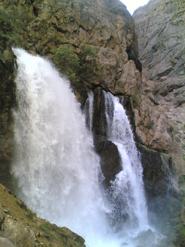 ابشار چکان الیگودرز